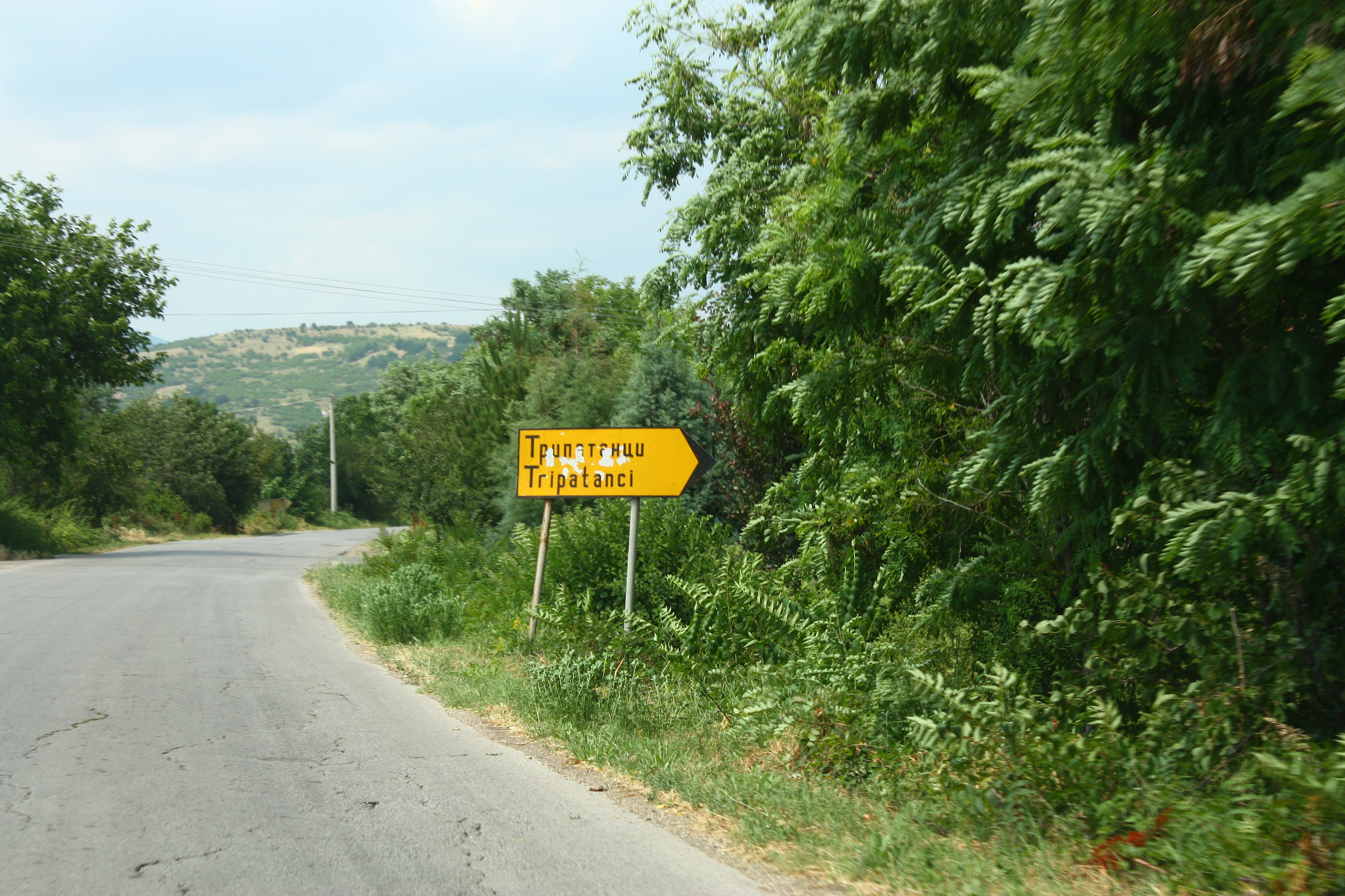 Tripatanci, Macedonia